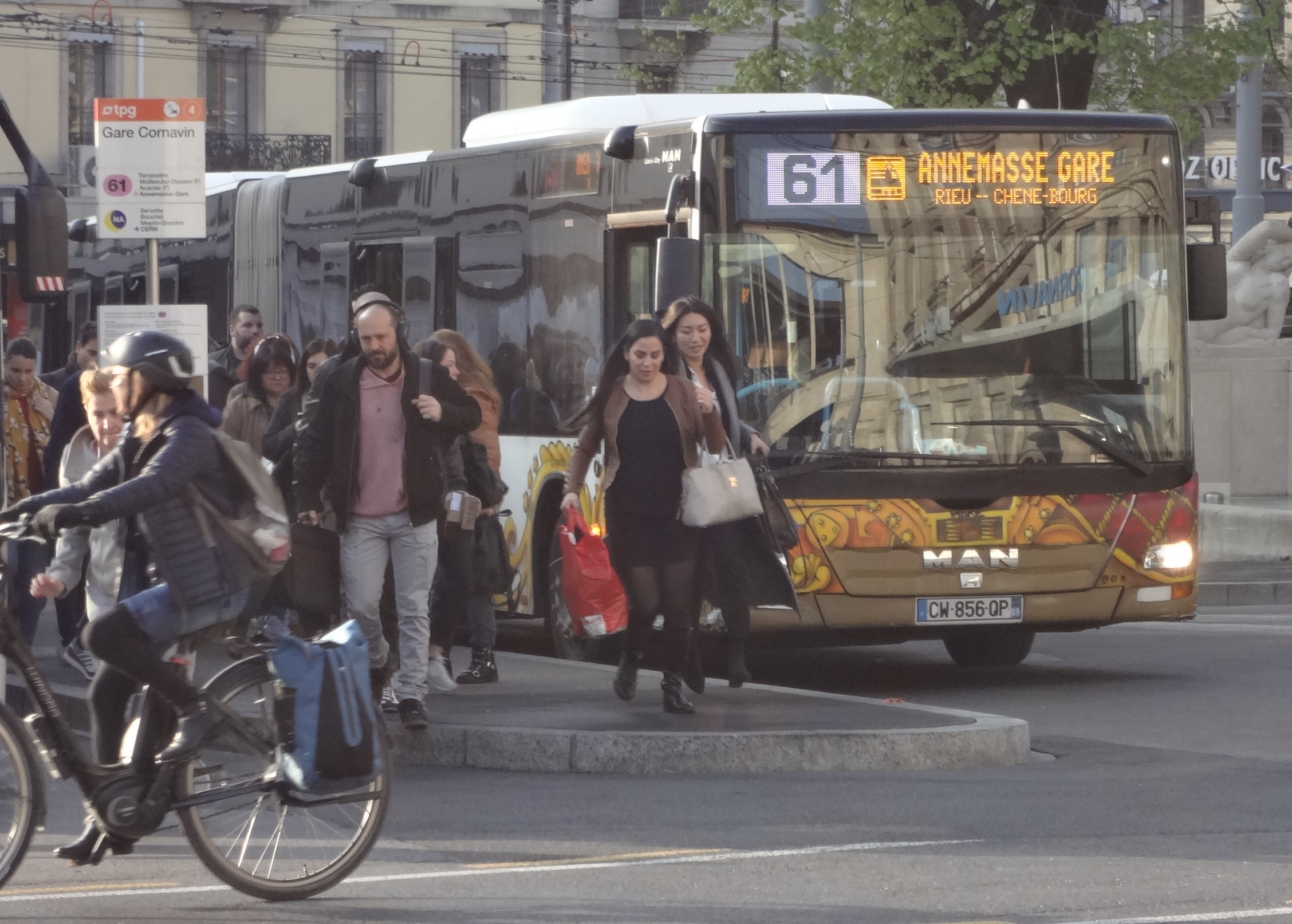 Bus TPG ligne 61 pour Annemasse, sur la place Cornavin à Genève. Décoré pour faire connaître le « Léman Express », ligne de train qui remplacera la ligne de bus dès décembre 2019.